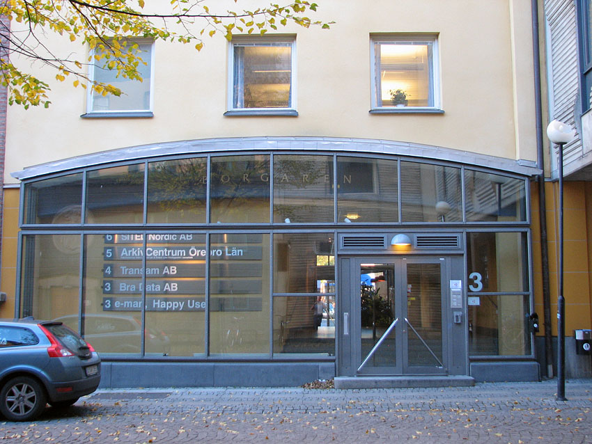 Entrance to ArkivCentrum Örebro län, Örebro, Sweden.